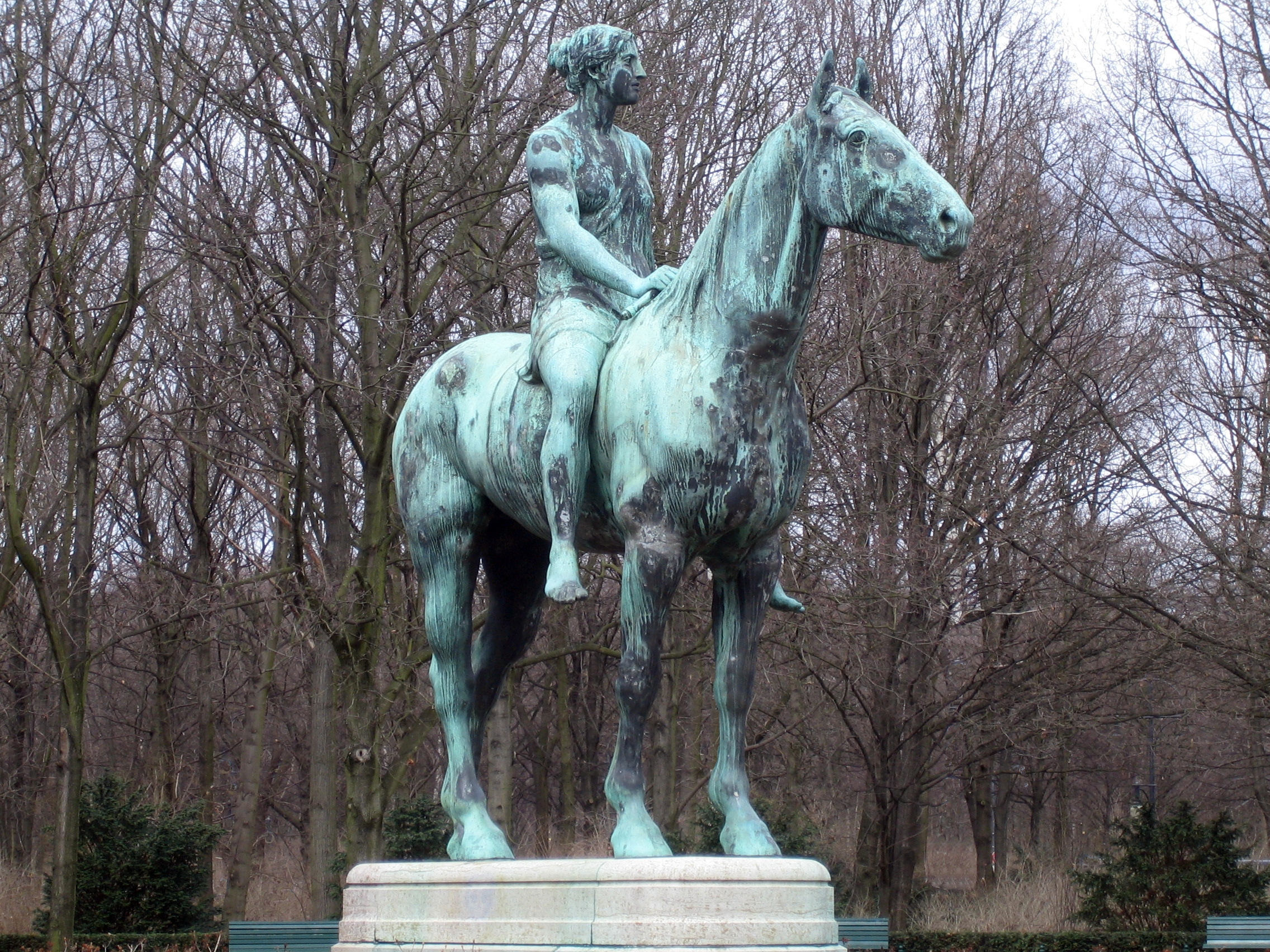 Sculpture Amazone zu Pferde (1895) by Louis Tuaillon. Berlin-Tiergarten/Berlin/Germany